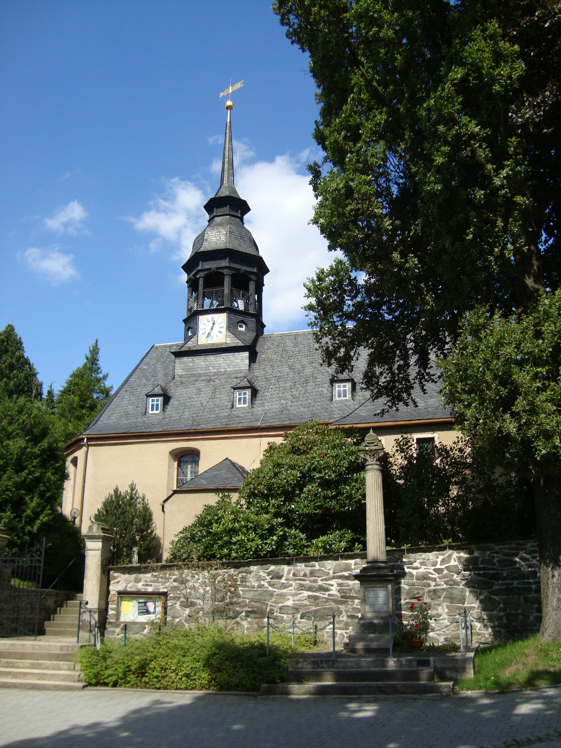 Kirche in Amtsberg OT Dittersdorf im Erzgebirge